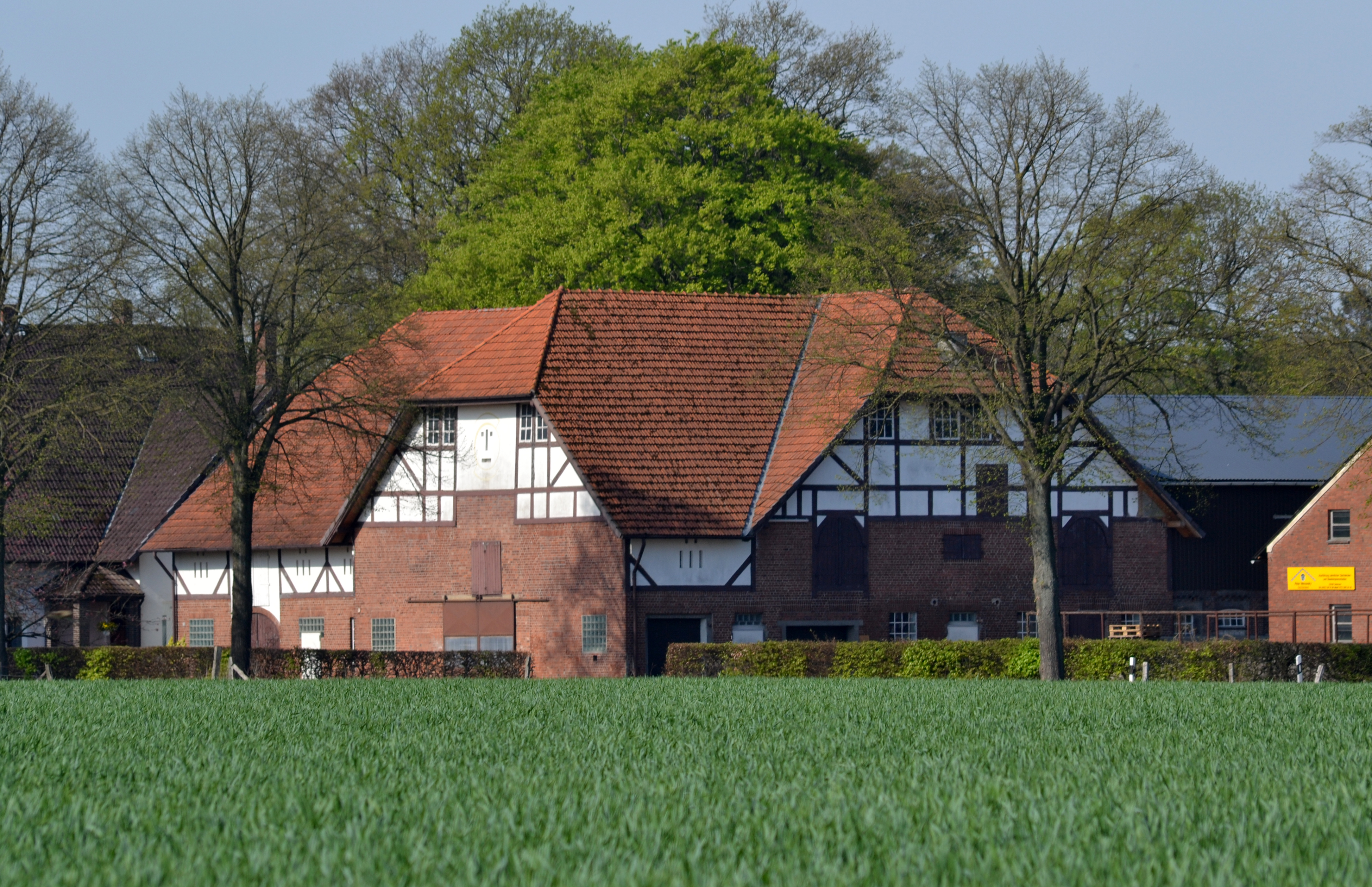 Das Wohn- und Wirtschaftsgebäude in Bevern ( Holstein) Hauptstraße (Kulturdenkmal)